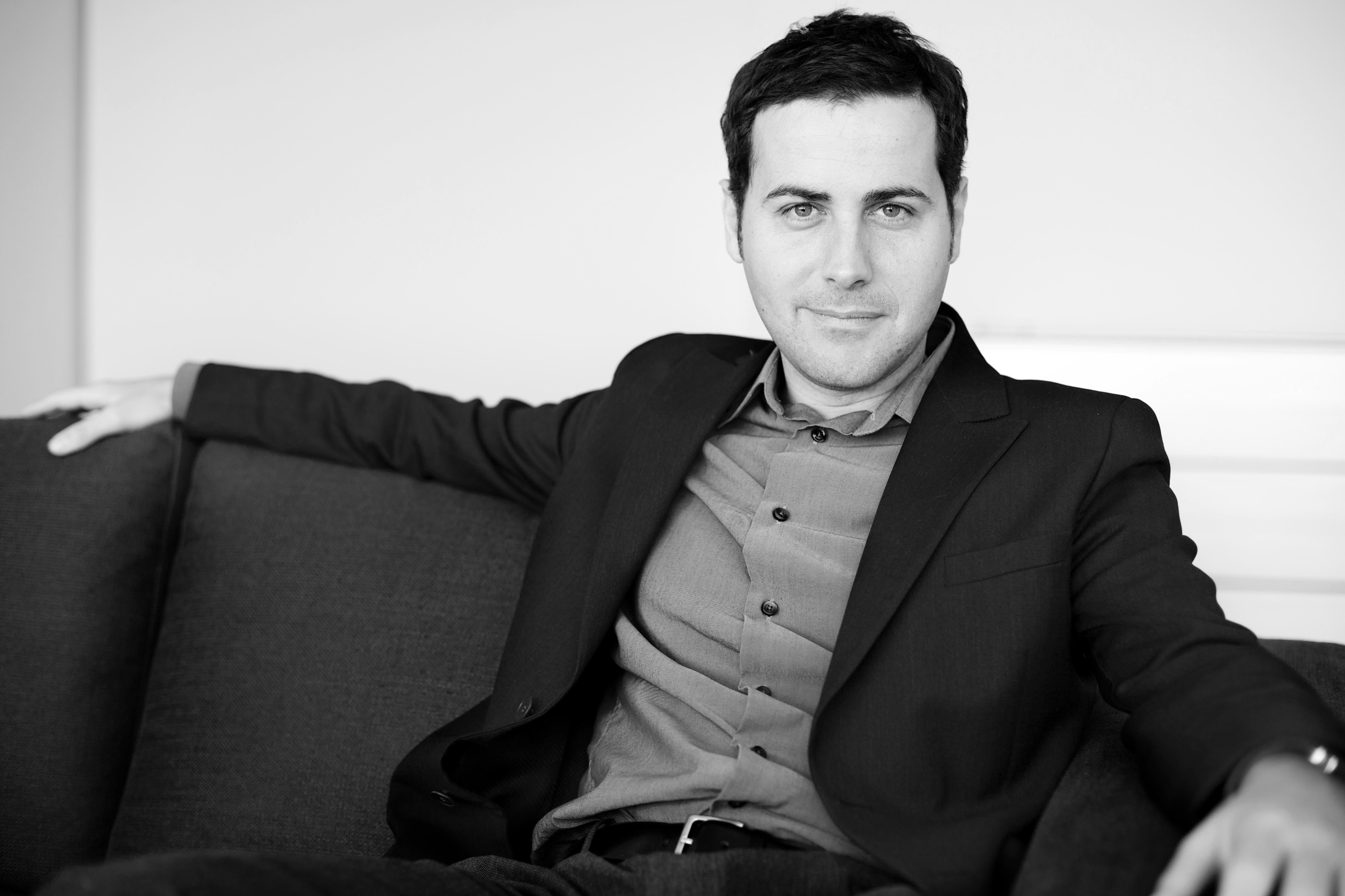 Imagen del arquitecto Fran Silvestre Navarro